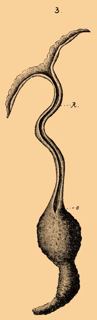 Иллюстрация к статье Эхиуровые из энциклопедии Брокгауза и Ефрона